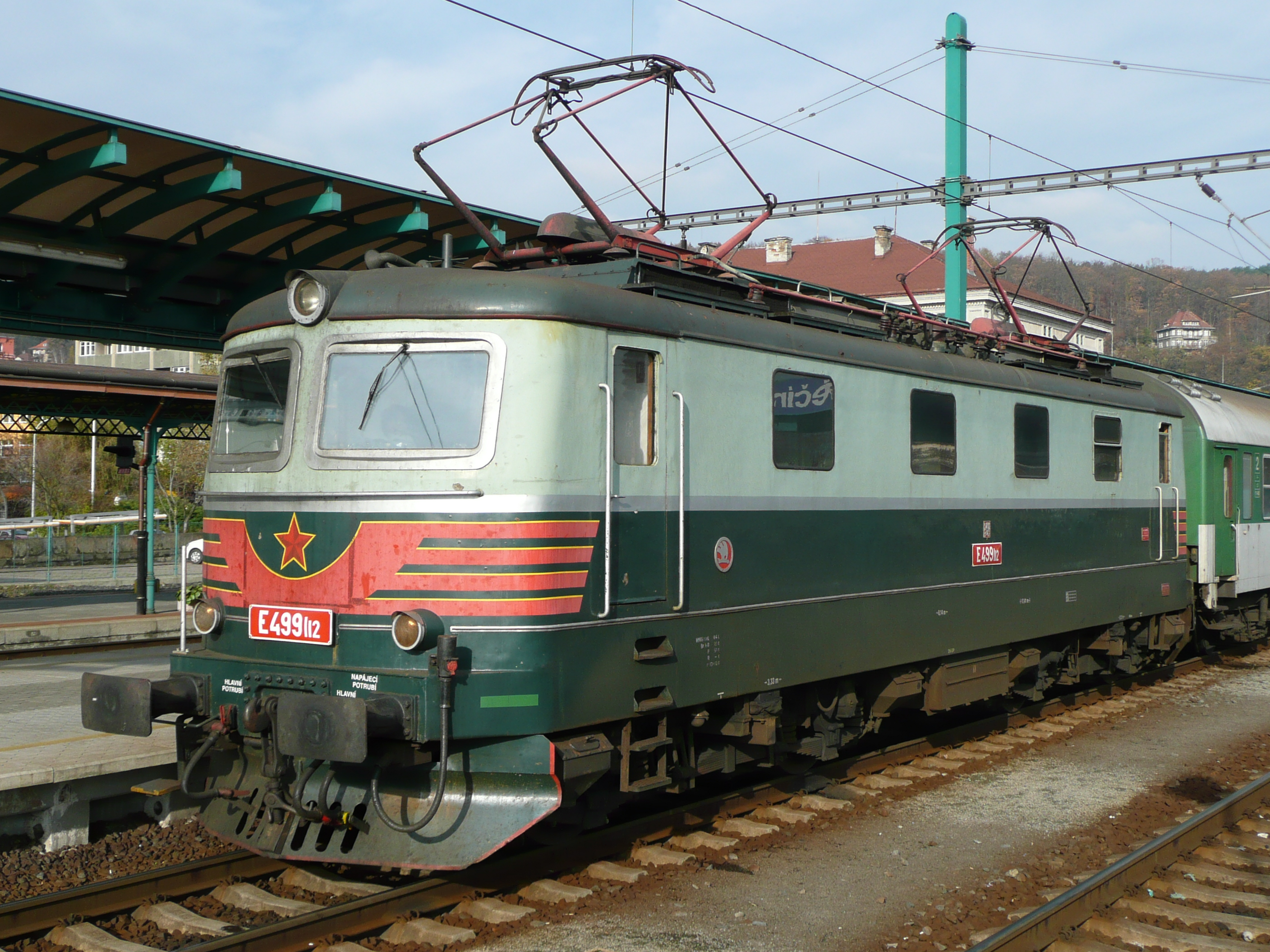 E 499 112 vor einem Personenzug in Děčín h.l.n.